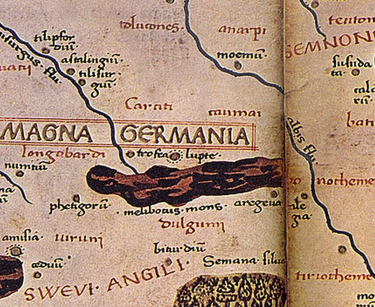 Die Ortsbezeichnung "BICURGIUM", Detailbild von der Karte zur Magna Germania.